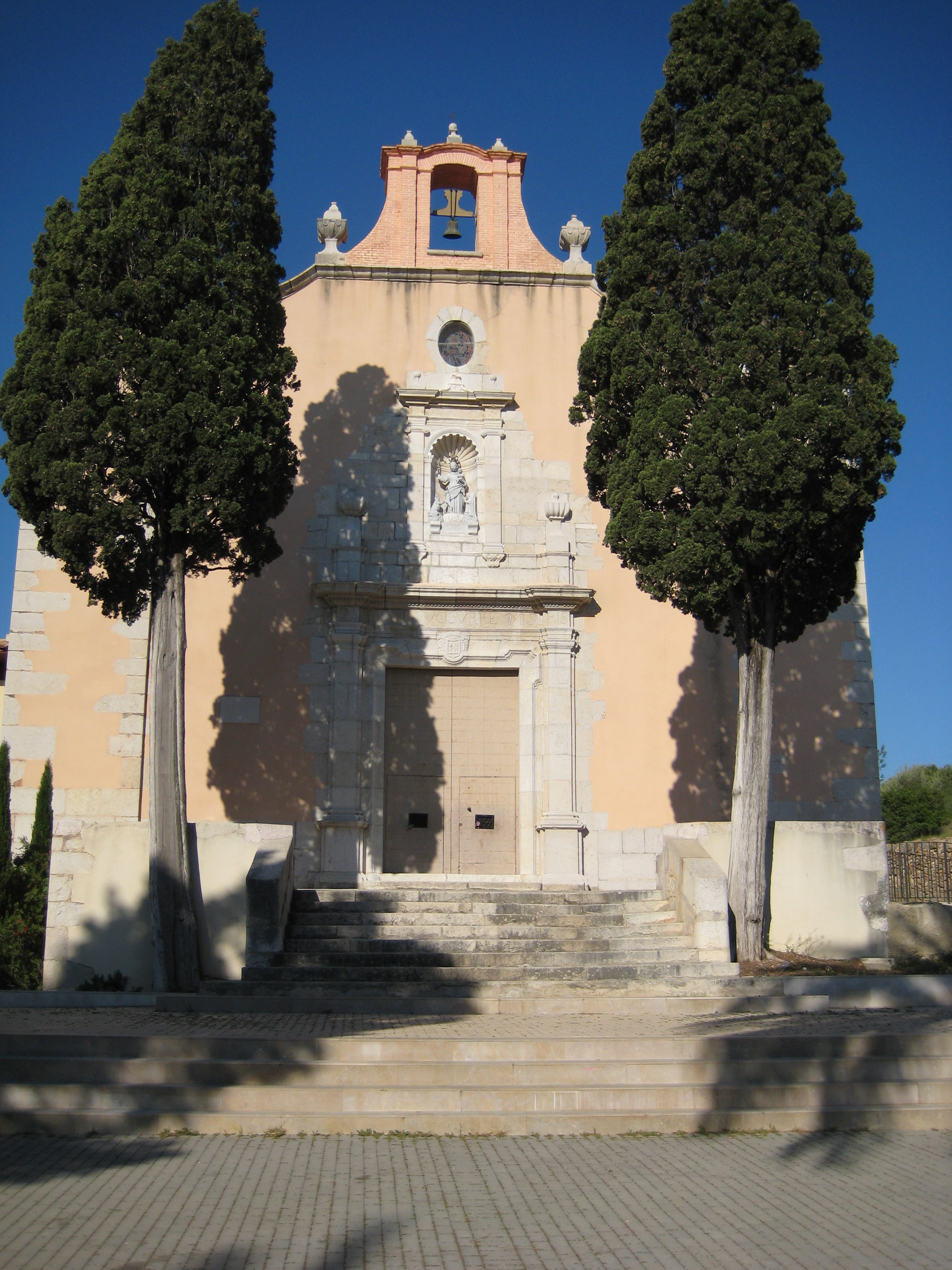 Ermita de la Mare de Déu del Socós de Càlig (Baix Maestrat)